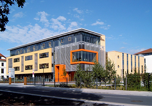 Ansicht Handwerkskammer Dresden